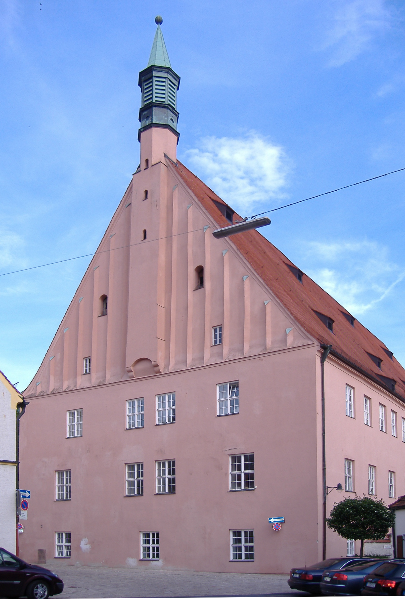 Die Hohe Schule, das Hauptgebäude der ehemaligen Universität Ingolstadt.